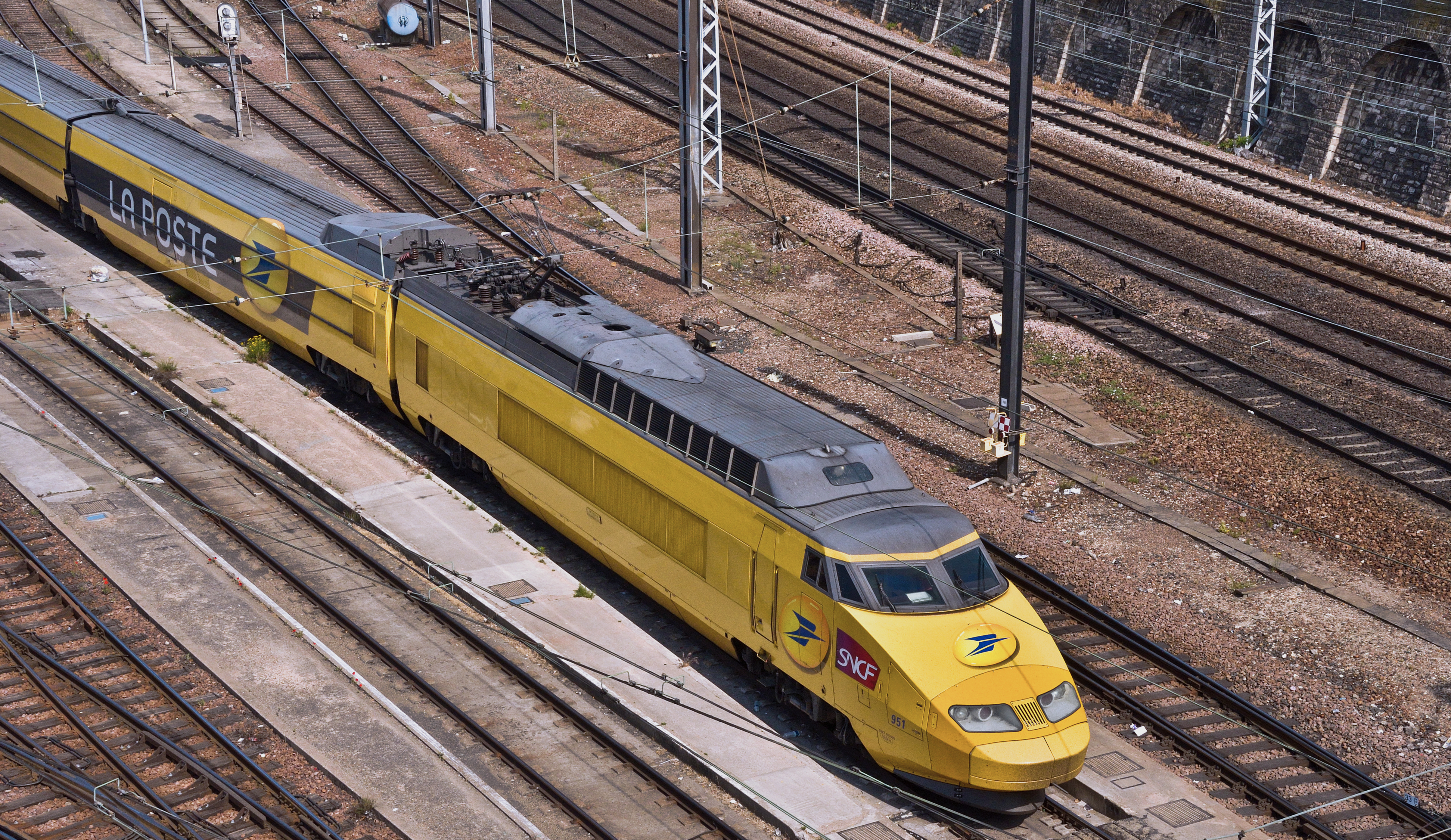 SNCF Technicentre Sud Est Européen.